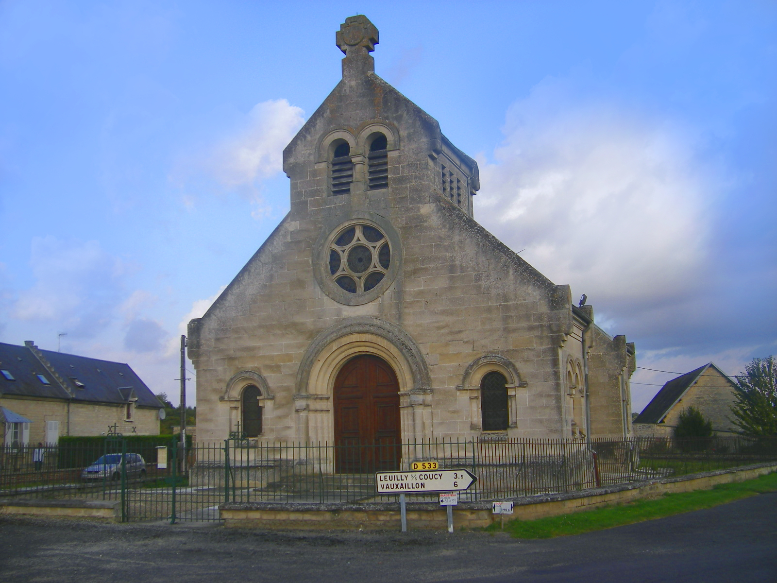 Landricourt